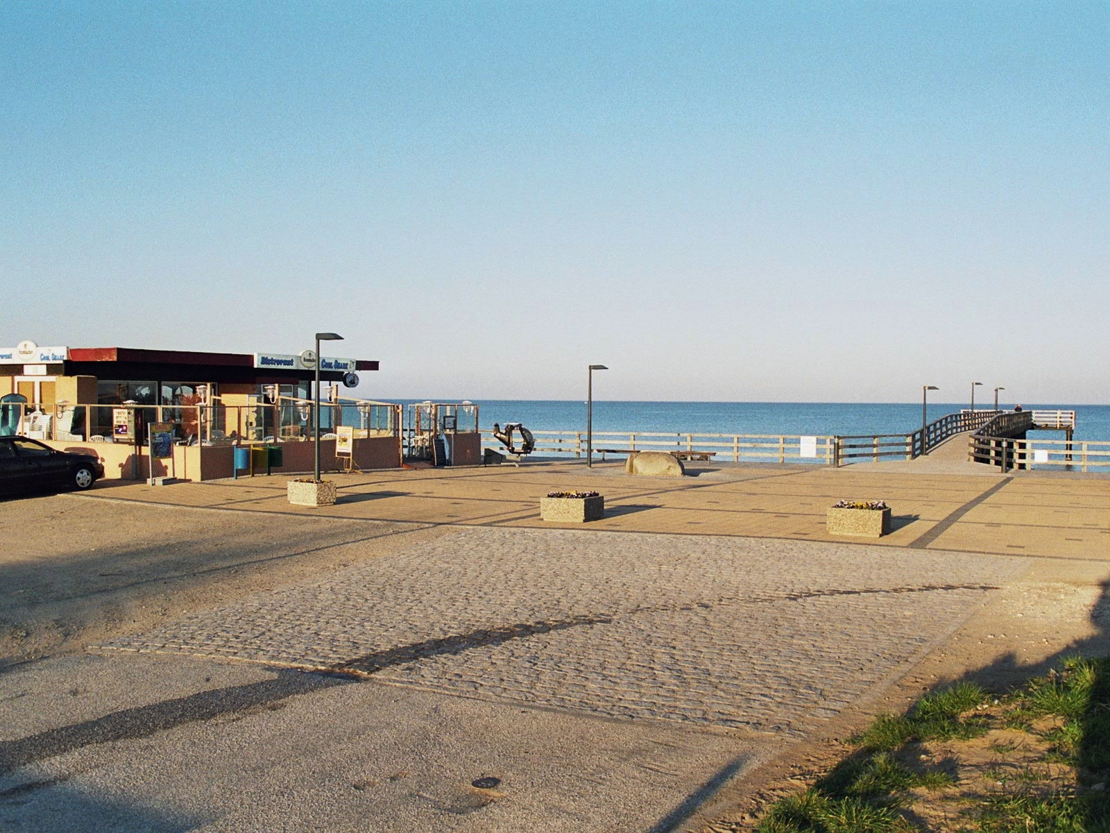 Strandpromenade mit Seebrücke nahe den Campingplätzen am Meer in Süssau Ostholstein